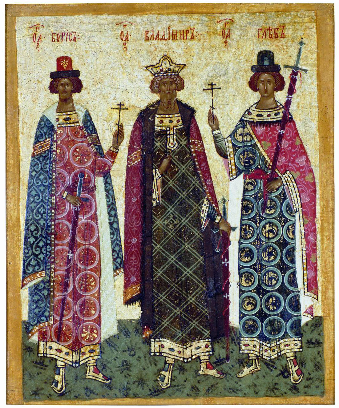 Russian icon of XV-XVI c. with St. Vladimir, Boris and Gleb. Икона новгородской школы, 33.5 х 29 мм, с изображением св. Владимира, Бориса и Глеба. Находится в дом-музее П. Д. Корина (филиал ГТГ), Москва, Россия. Воспроизводится по изданию: Лазарев В.Н. «Страницы истории новгородской живописи. Двусторонние таблетки из собора Св. Софии в Новгороде». М., Искусство, 1983 Икона двусторонняя, на лицевой стороне - Преображение.